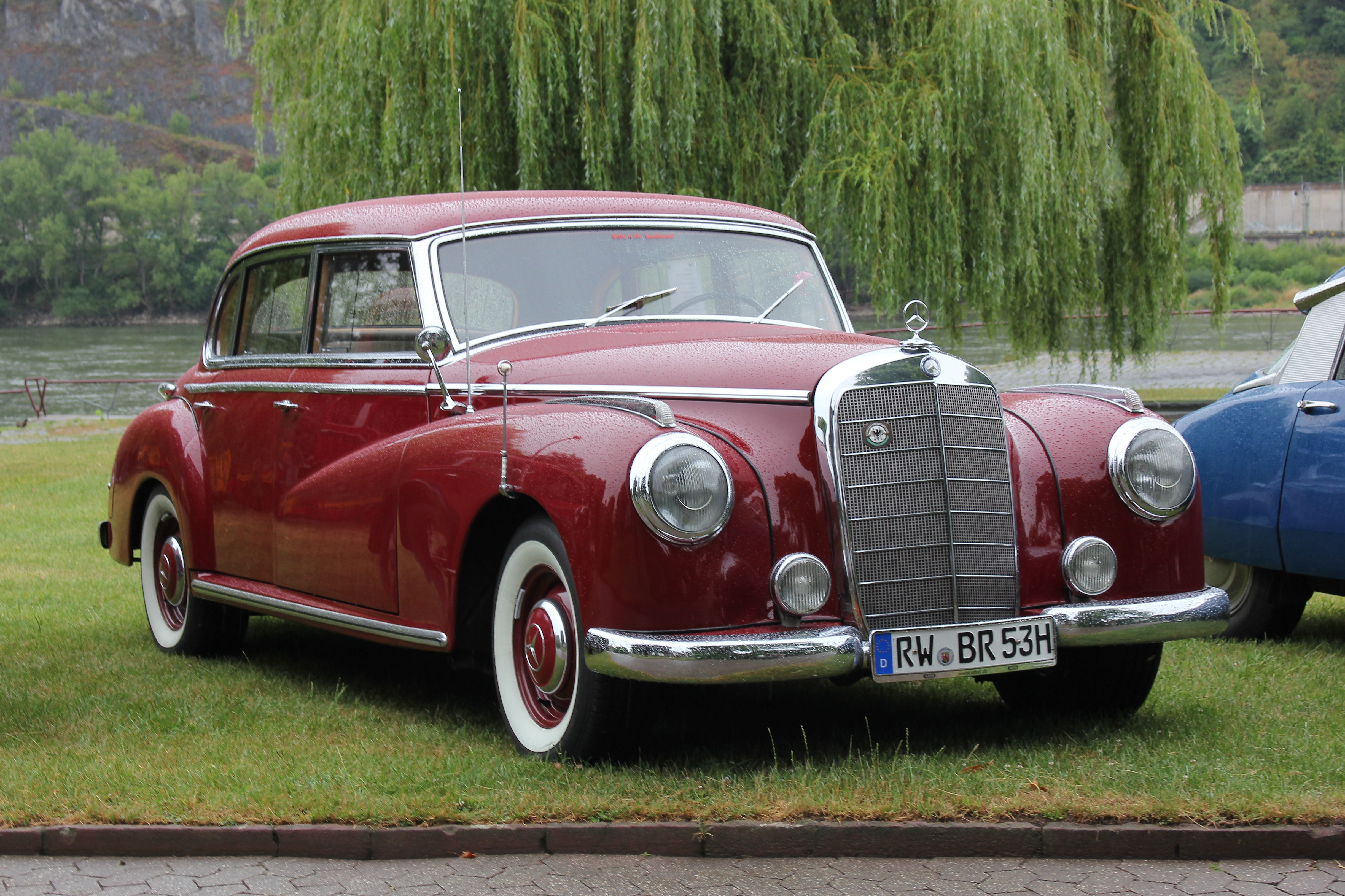 Mercedes-Benz W 186, 6-Zylinder-Motor mit obenliegender Nockenwelle, 2996 cm³, 115 PS bei 4600/min, vollsynchronisiertes Vierganggetriebe; Vorderradaufhängung an jeweils zwei Dreiecklenkern, hinten Pendelachse, Schraubenfedern und Teleskopstoßdämpfer, zuschaltbare Drehstabfedern; Erstzulassung 1. Juli 1953 (Kennzeichen verändert)